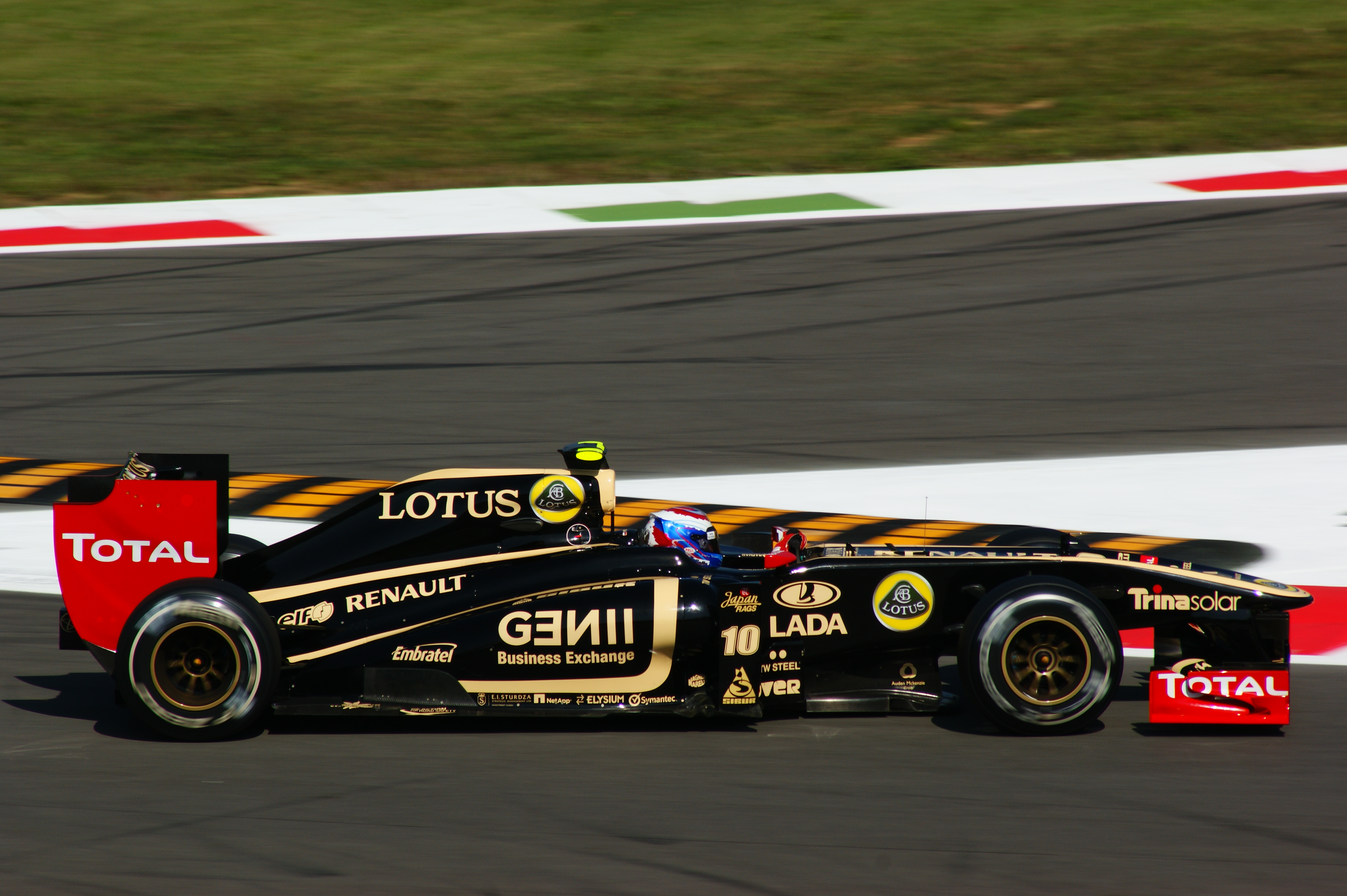 Vitaly Petrov alla prima variante Monza 2011